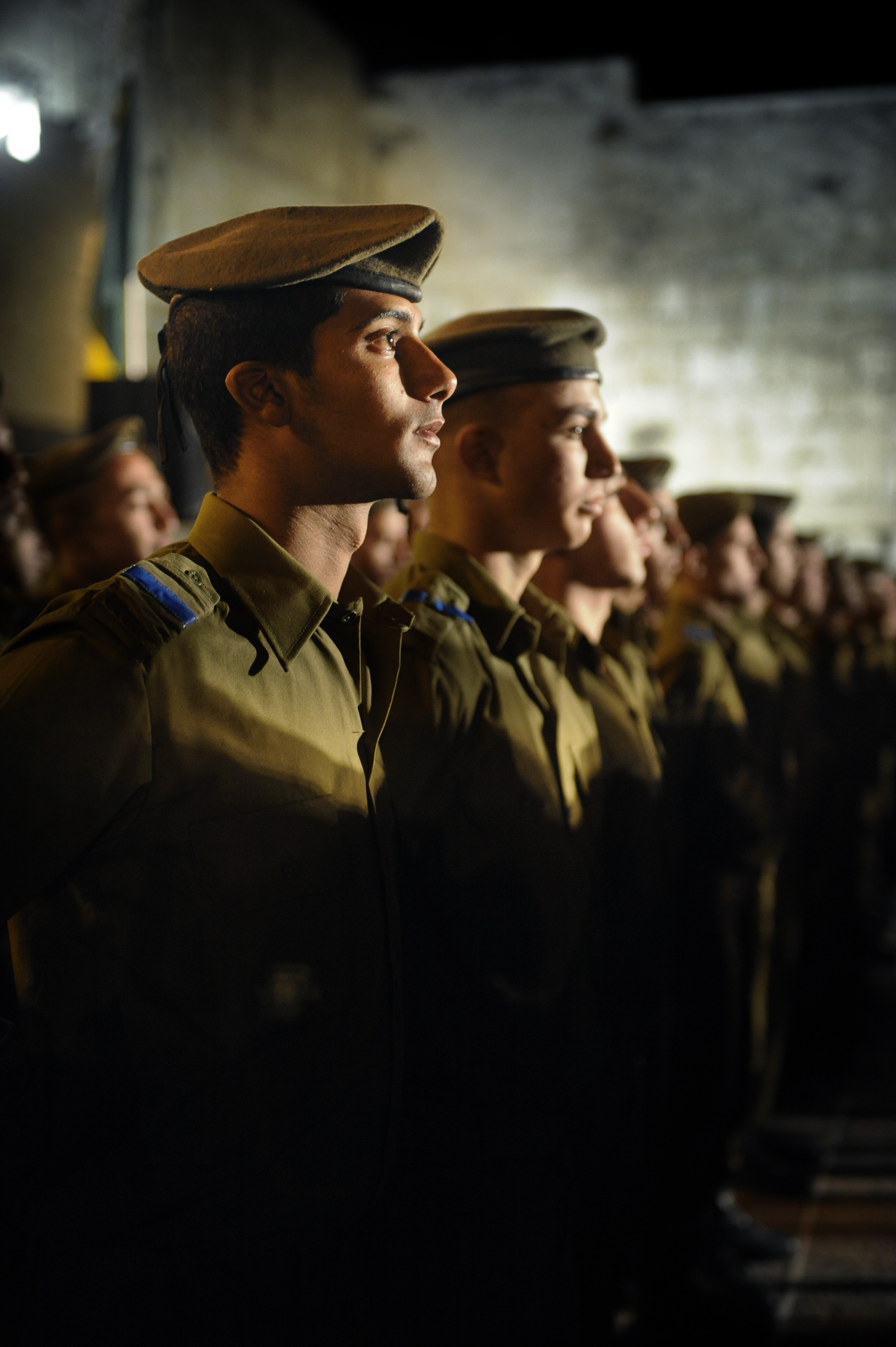 January 12, 2011. After two months of grueling basic training, the fresh cadets of the Golani Brigade are the first cycle of recruits in more than 20 years to have their swearing-in ceremony before the Western Wall of the Great Temple in Jerusalem. Both the ceremony itself, and the location next to one of the most ancient and venerated sites in Israel, are very significant for these young men. Featured as "Photo of the Day" on January 13, 2011. Photo by Ori Shifrin בתום חודשיים של טירונות מפרכת, טירונים אלה של חטיבת גולני הם המחזור הראשון מזה 20 שנה אשר עורך את טקס ההשבעה שלו בכותל המערבי בירושלים. הן מעמד הטקס עצמו ומיקומו בסמוך לאחד מהאתרים העתיקים והחשובים במדינת ישראל מהווים מקור התרגשות עבור הטירונים. התמונה פורסמה כ"תמונת היום" בתאריך ינואר 13, 2011. צולם על ידי אורי שיפרין